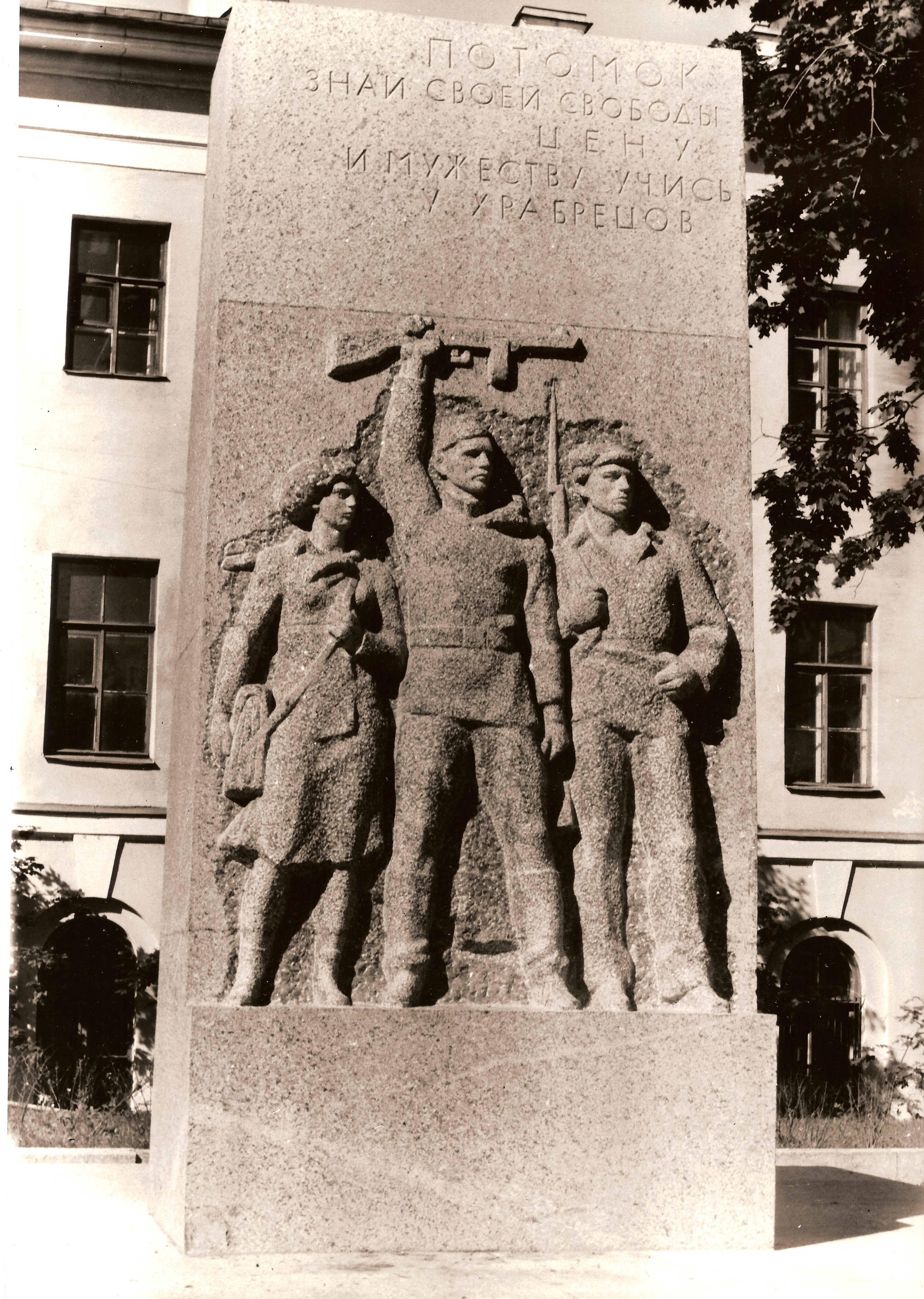 Denkmal für Studenten und Lehrer des Leningrader Berginstituts